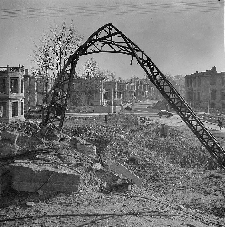 Original image description from the Deutsche FotothekDeformierter Stahlgittermast an der Eisenbahnstrecke nach Pirna gegen Ruinen des Wohngebietes Wiener Straße/Beuststraße